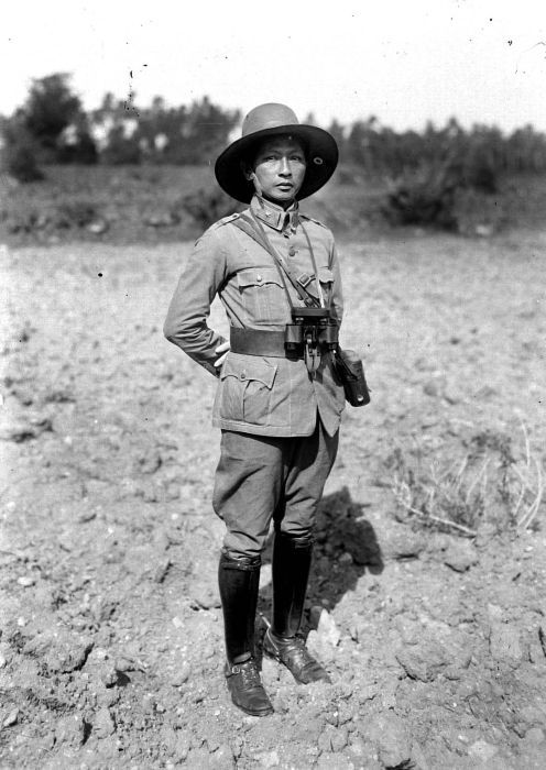 Repronegatief. Portret van de Majoor Commandant van het korps Barisan te Bangkalan, Madoera